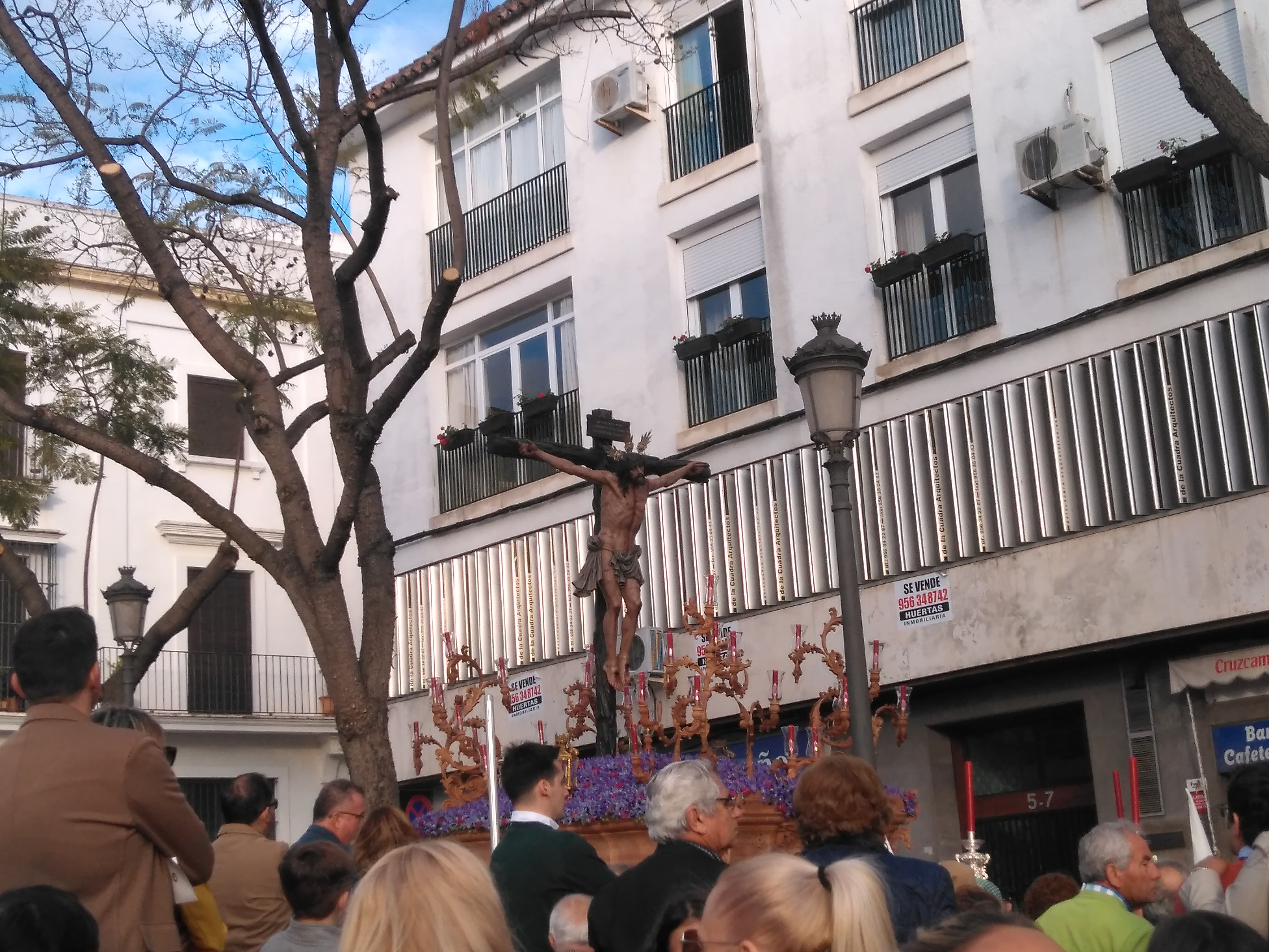 Cristo de la Sed (Jerez de la Frontera, España)